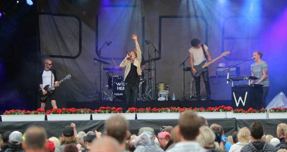 Dúné under deres Wild Hearts Tour koncert på Sølund Festival 2013.